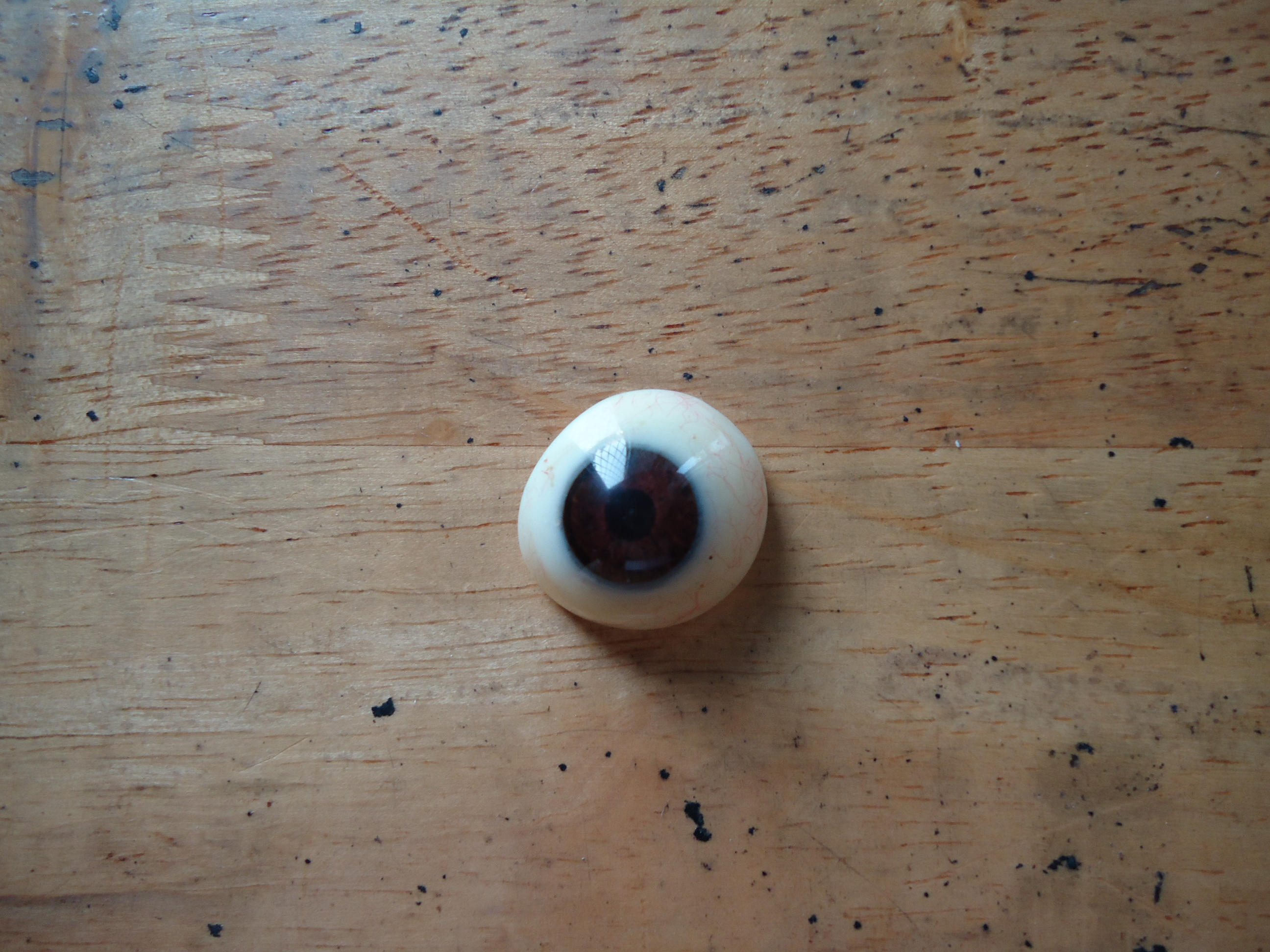 Artificial Eye 2